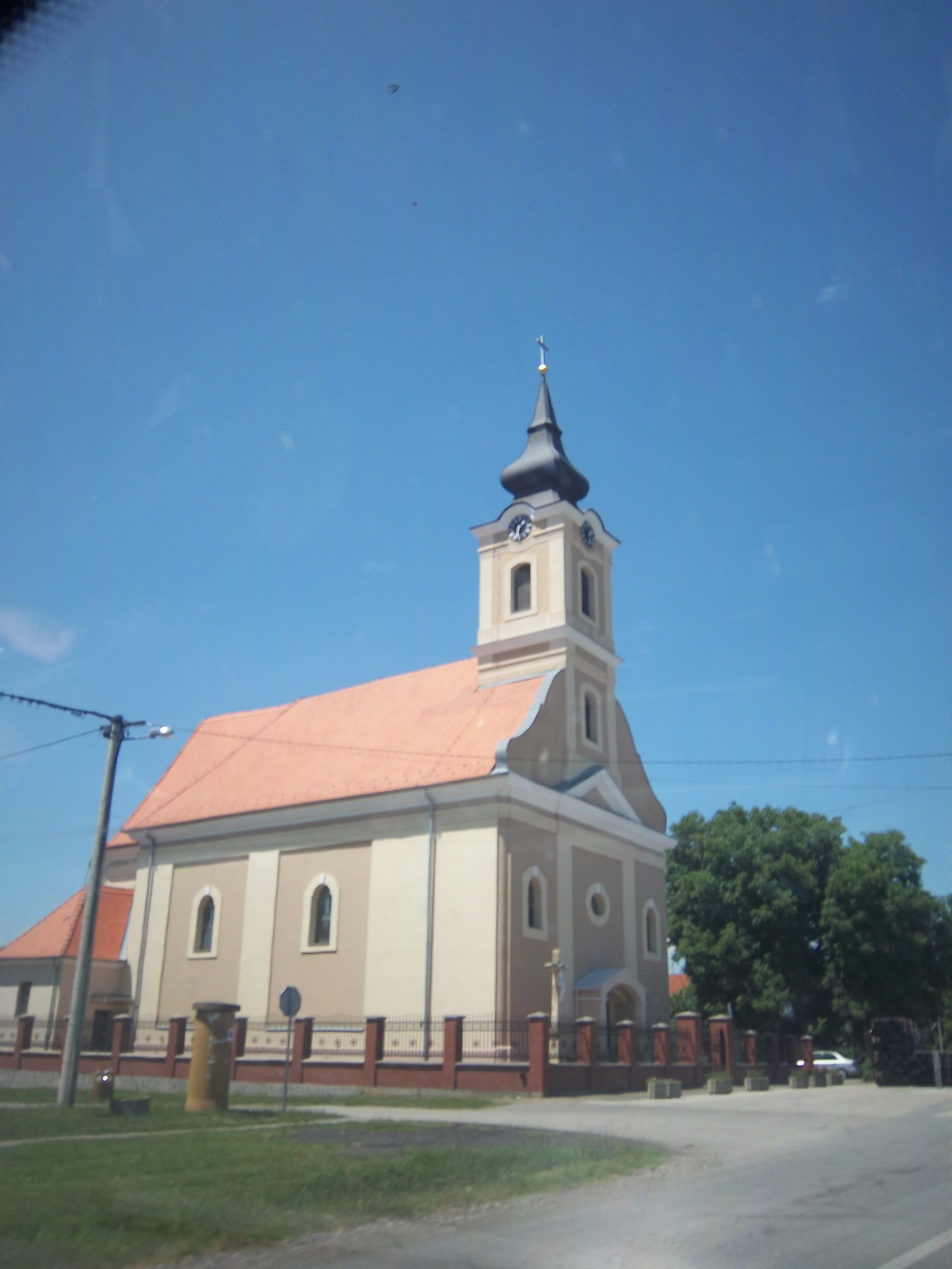 Srpskohrvatski / српскохрватски: Katolička crkva u Starim Jankovcima